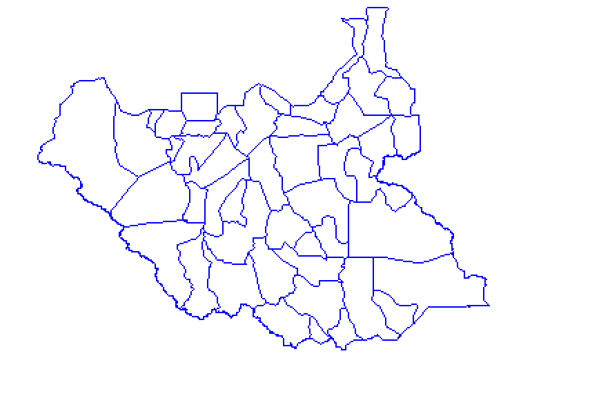 Mapa de los Condados de Sudan del Sur, luego de la independencia (2011)